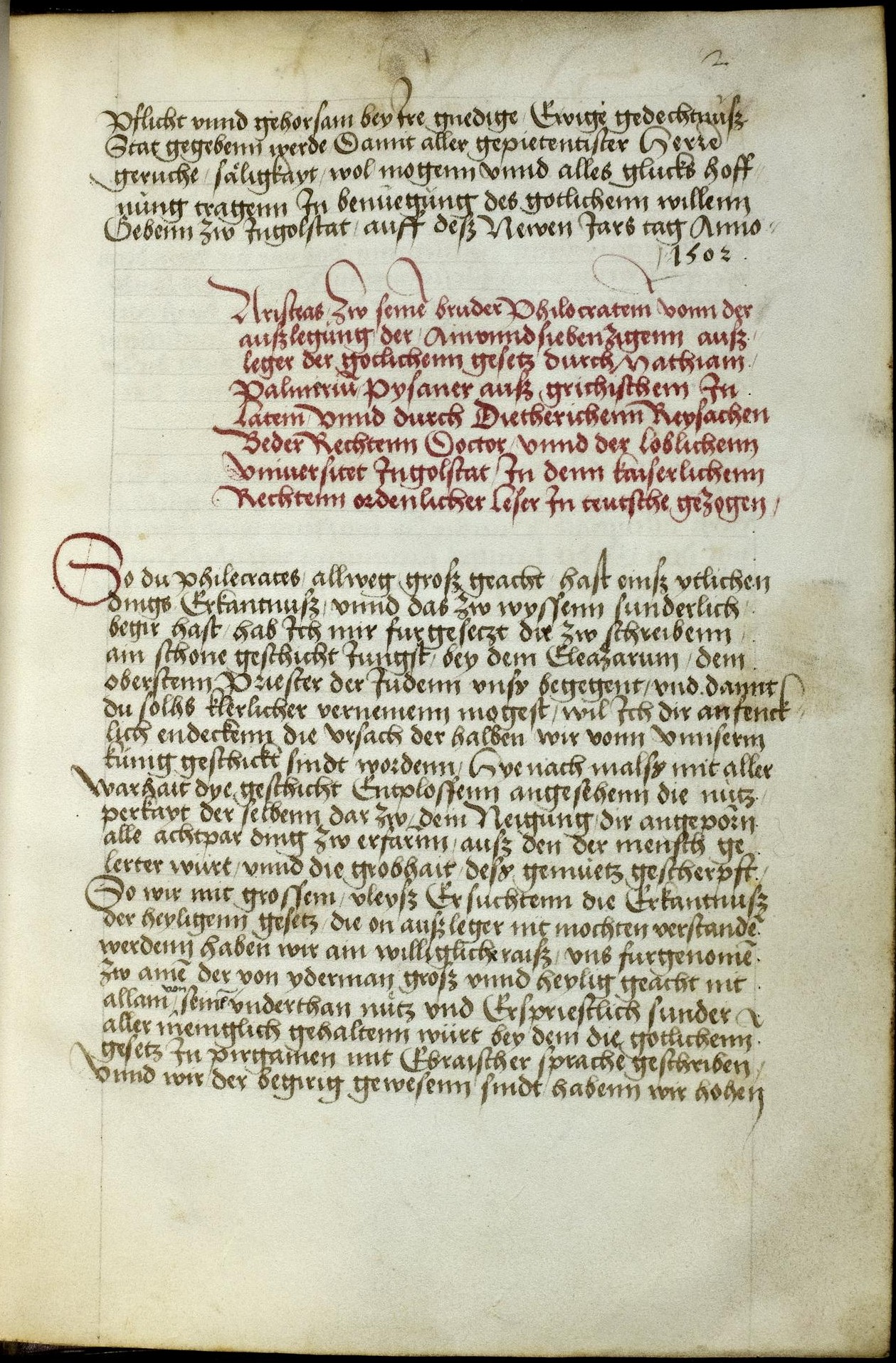 Codex Palatinus germanicus 10, Blatt 1r - Aristeas: Epistola ad Philocratem, deutsch (erste Textseite)